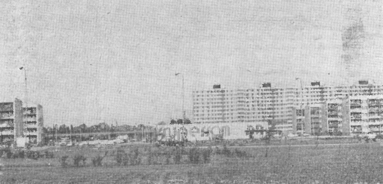 Osiedle Oświecenia - supersam. W tle blok 97-103 (deska); po prawej - budynki 91-97, 90-84, 83-77, 76-70